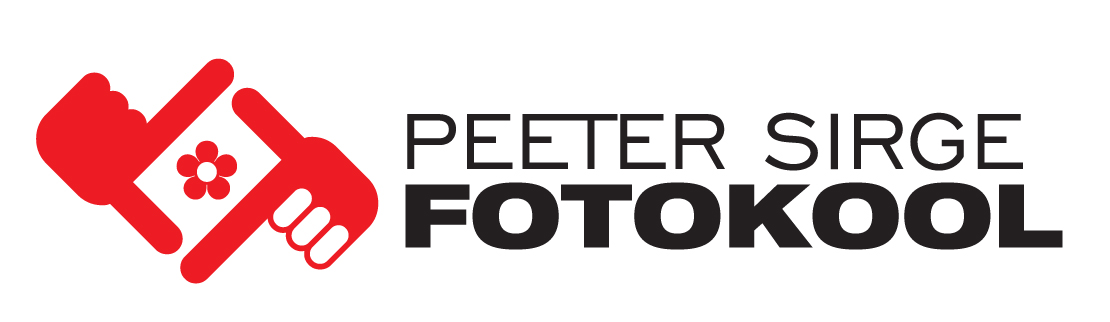 Peeter Sirge Fotokool logo